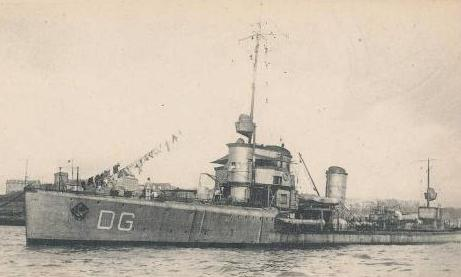 Der französische Zerstörer DELAGE ex H 147